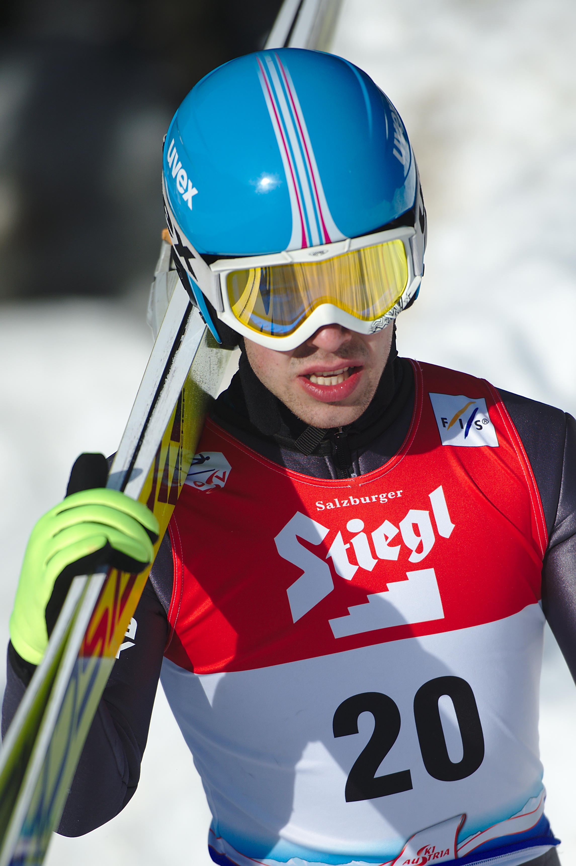 Wojciech Marusarz in Eisenerz 2017